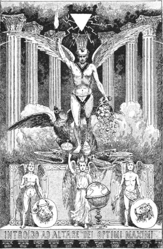 Illustration du Diable au XIXe siècle, page 309